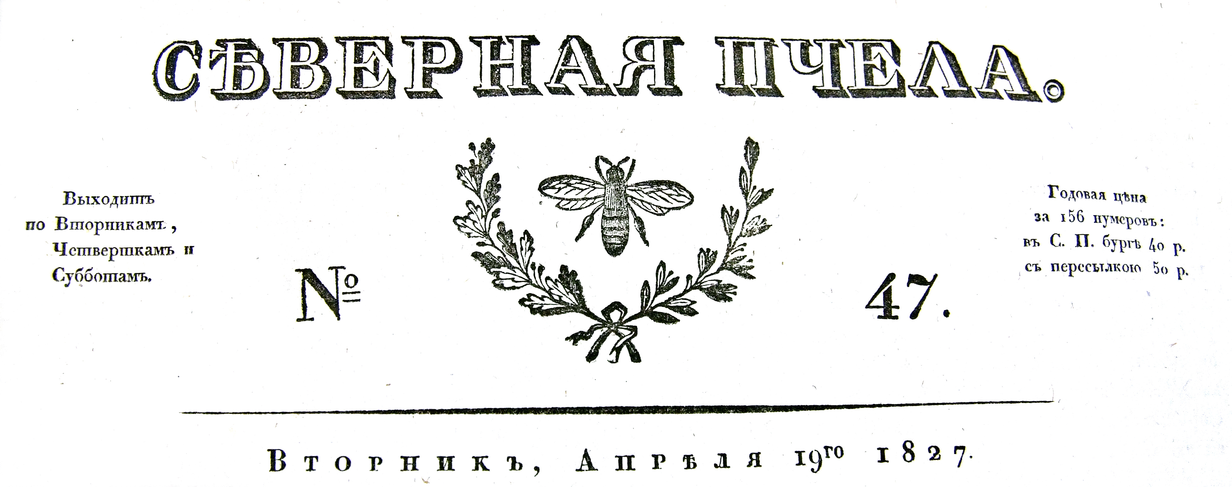 Логотип газеты "Северная пчела"